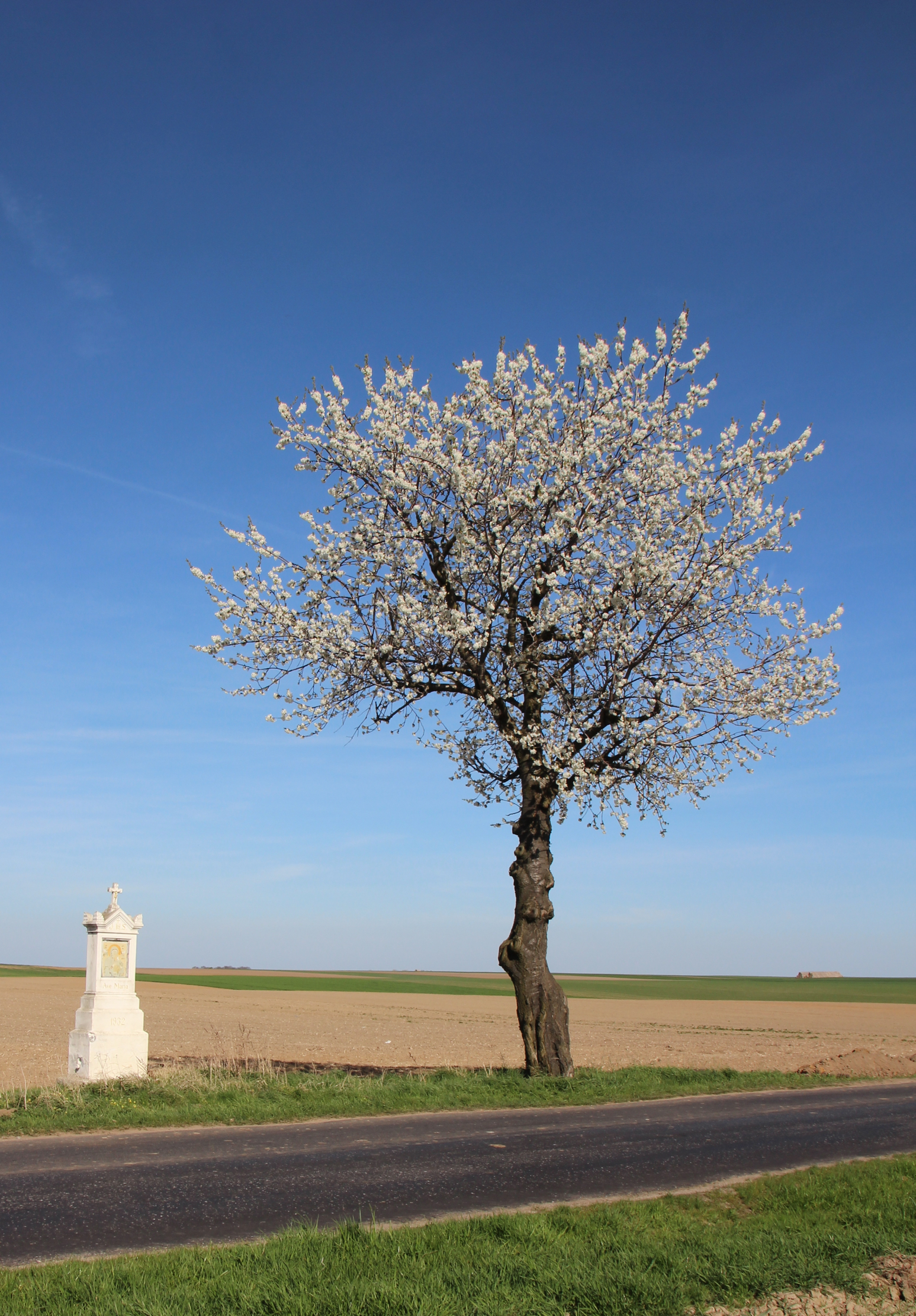 Przydrożny krzyż w Gminie Głogówek.